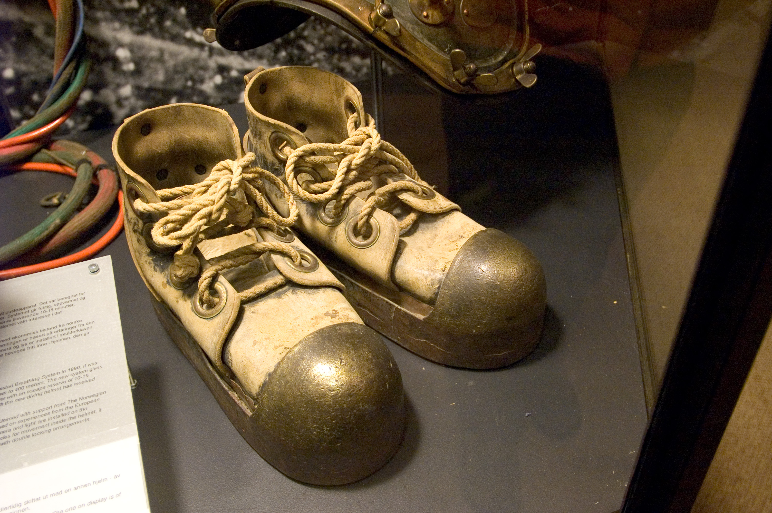 Diving shoes. Sjøfart Museum, Oslo, Norway. Author: Fanny Schertzer